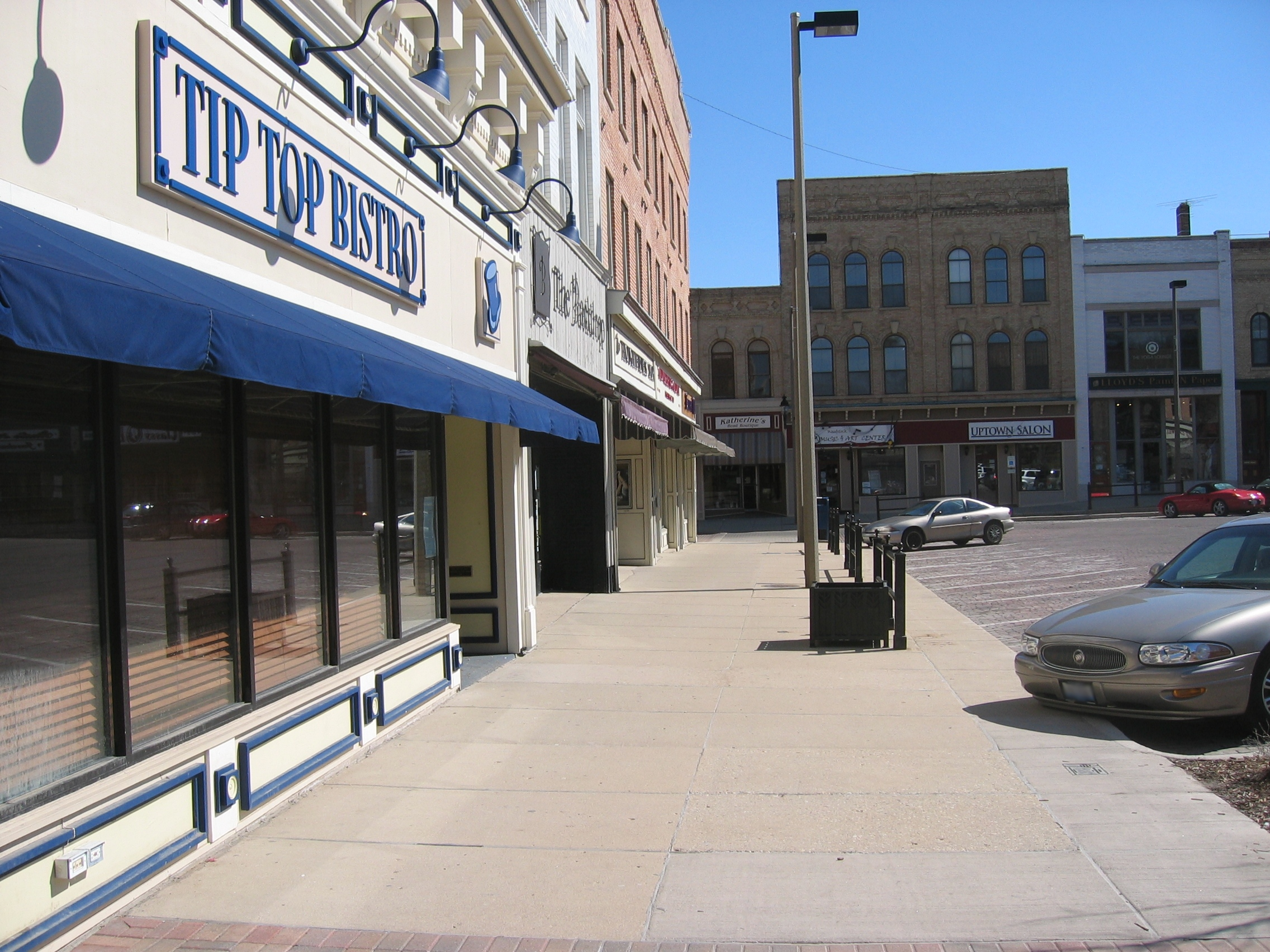 Drehort „Und täglich grüßt das Murmeltier“ (1992), Historic District, Woodstock, Illinois, USA